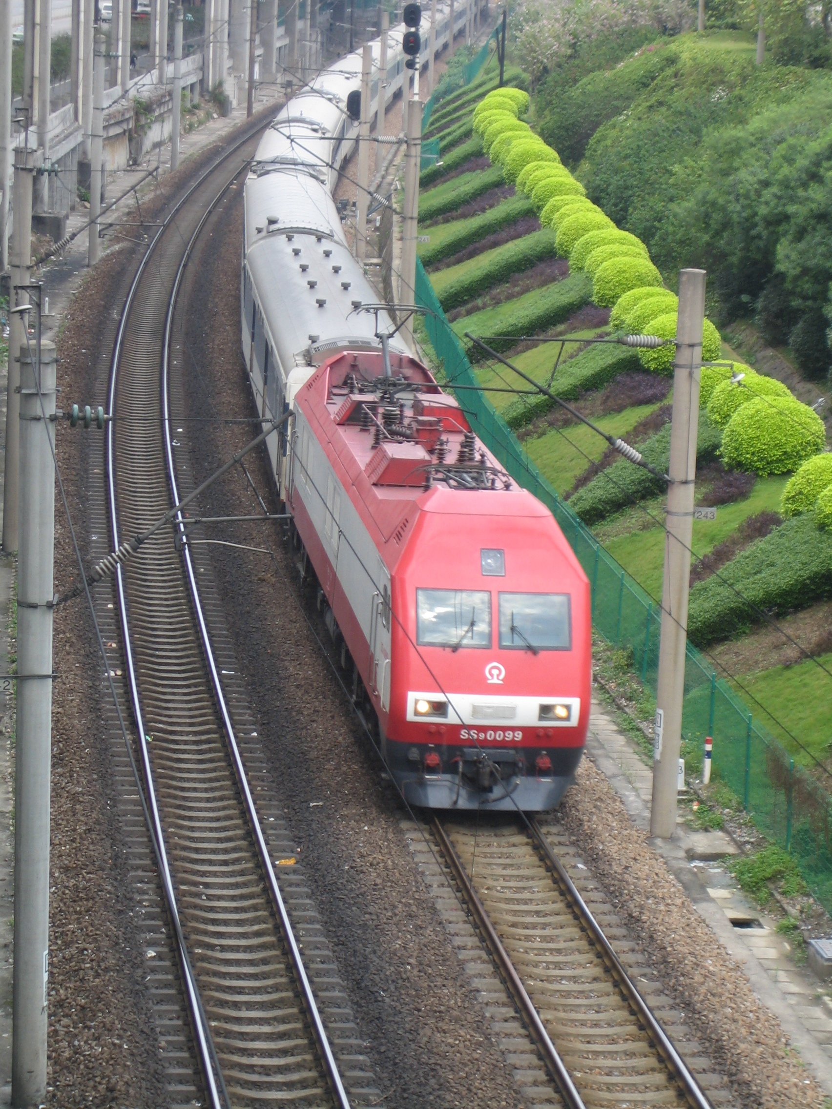 韶山九型改機車牽引25T型列車